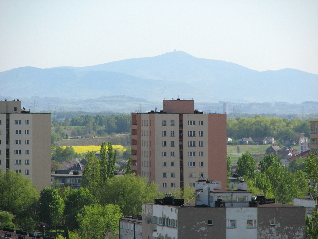 Lysá hora, Beskydy